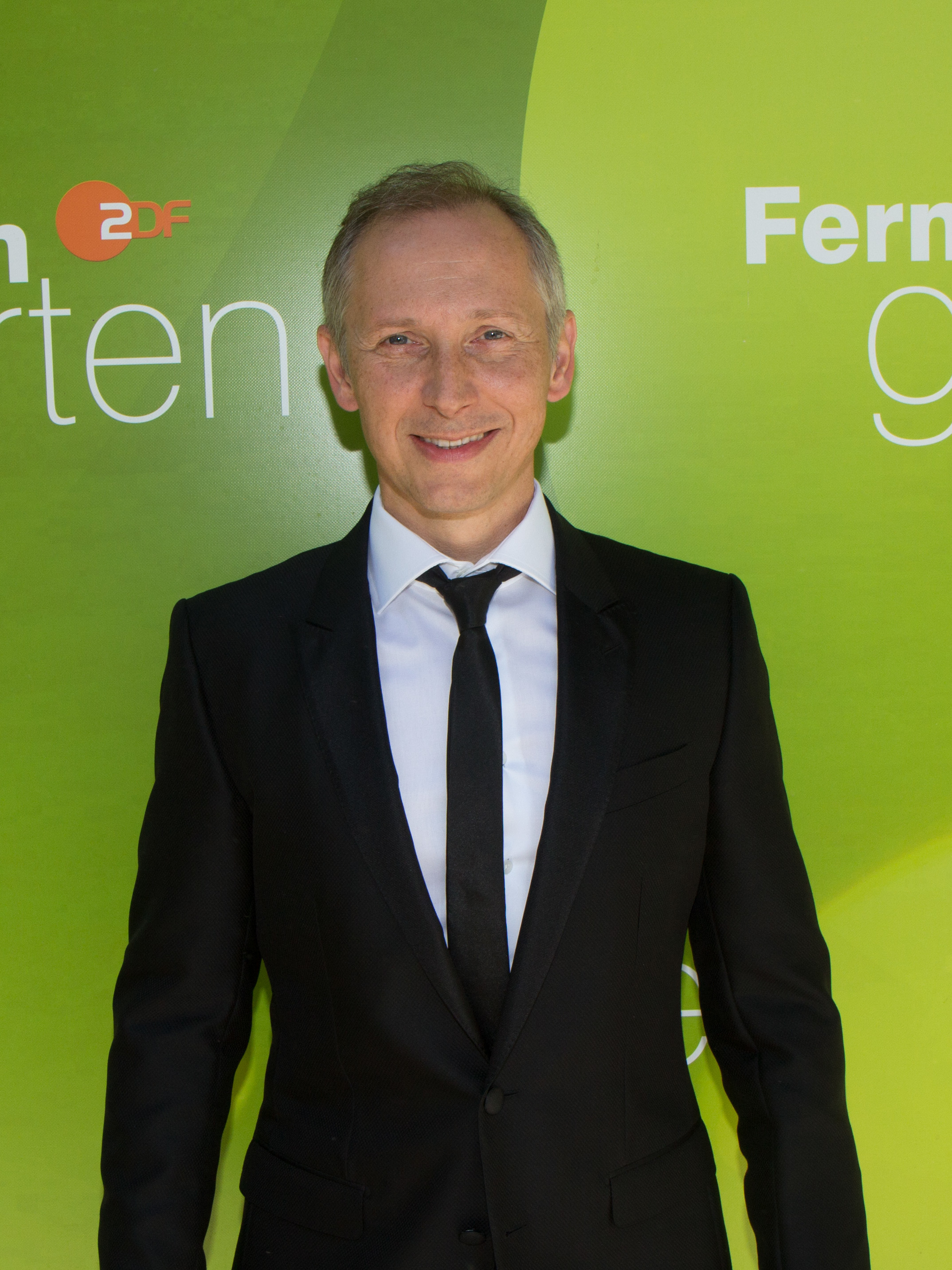 Helmut Lotti als Gast im ZDF-Fernsehgarten am 19. August 2018 in Mainz.